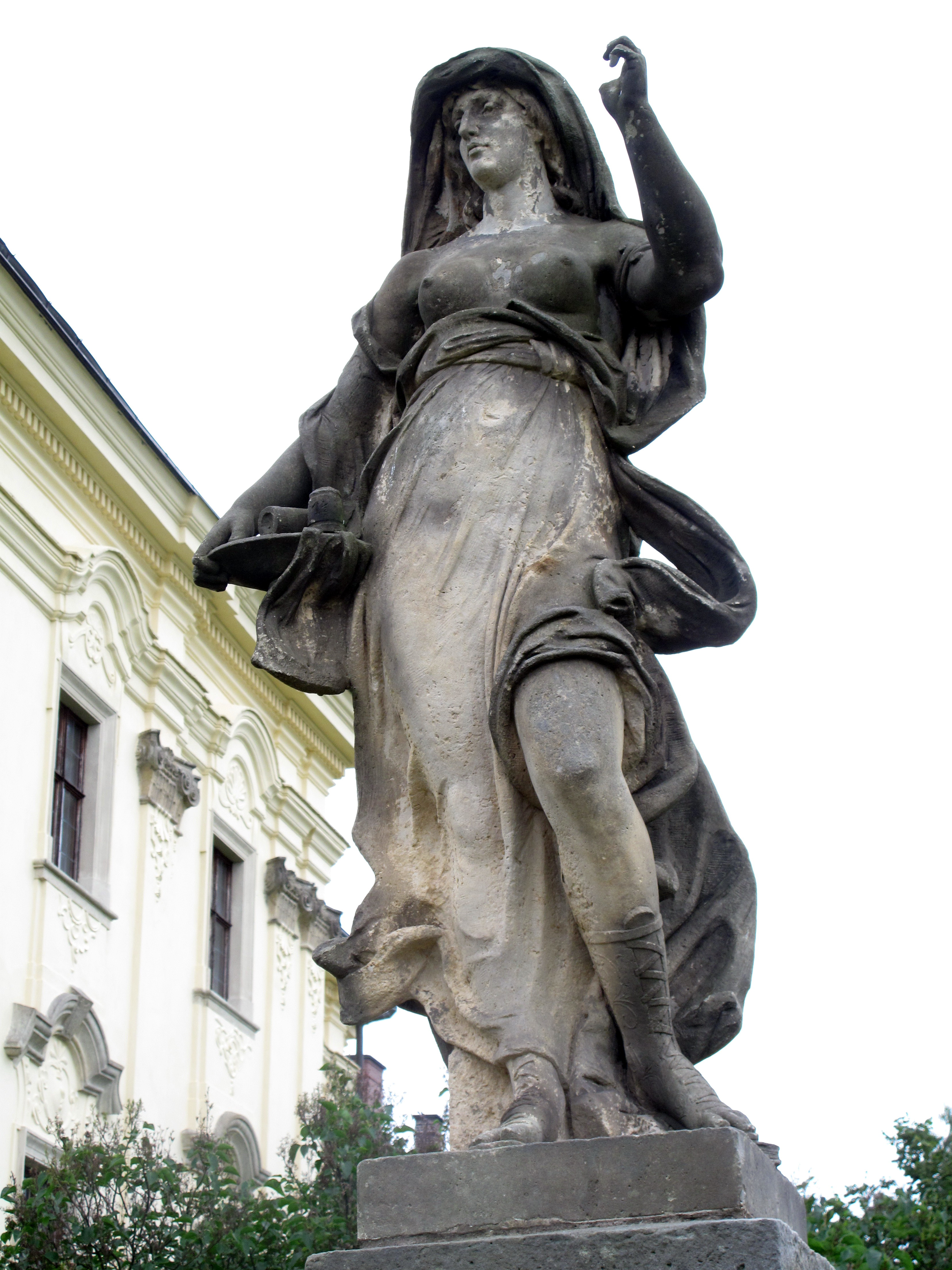 Socha zobrazující Podvod (ve starší publikacích je též označení "Šalba") na Kuksu, autorem je Bernard Otto Seeling